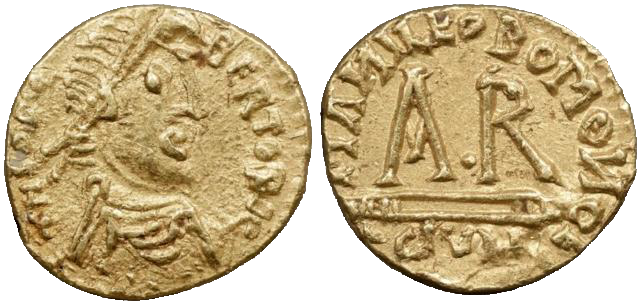 Tiers de sou de Théodebert II frappé à Clermont (595-612). BNF, monnaies, médailles et antiques. Avers : Buste drapé et diadémé à droite. Revers : A R dans le champ.